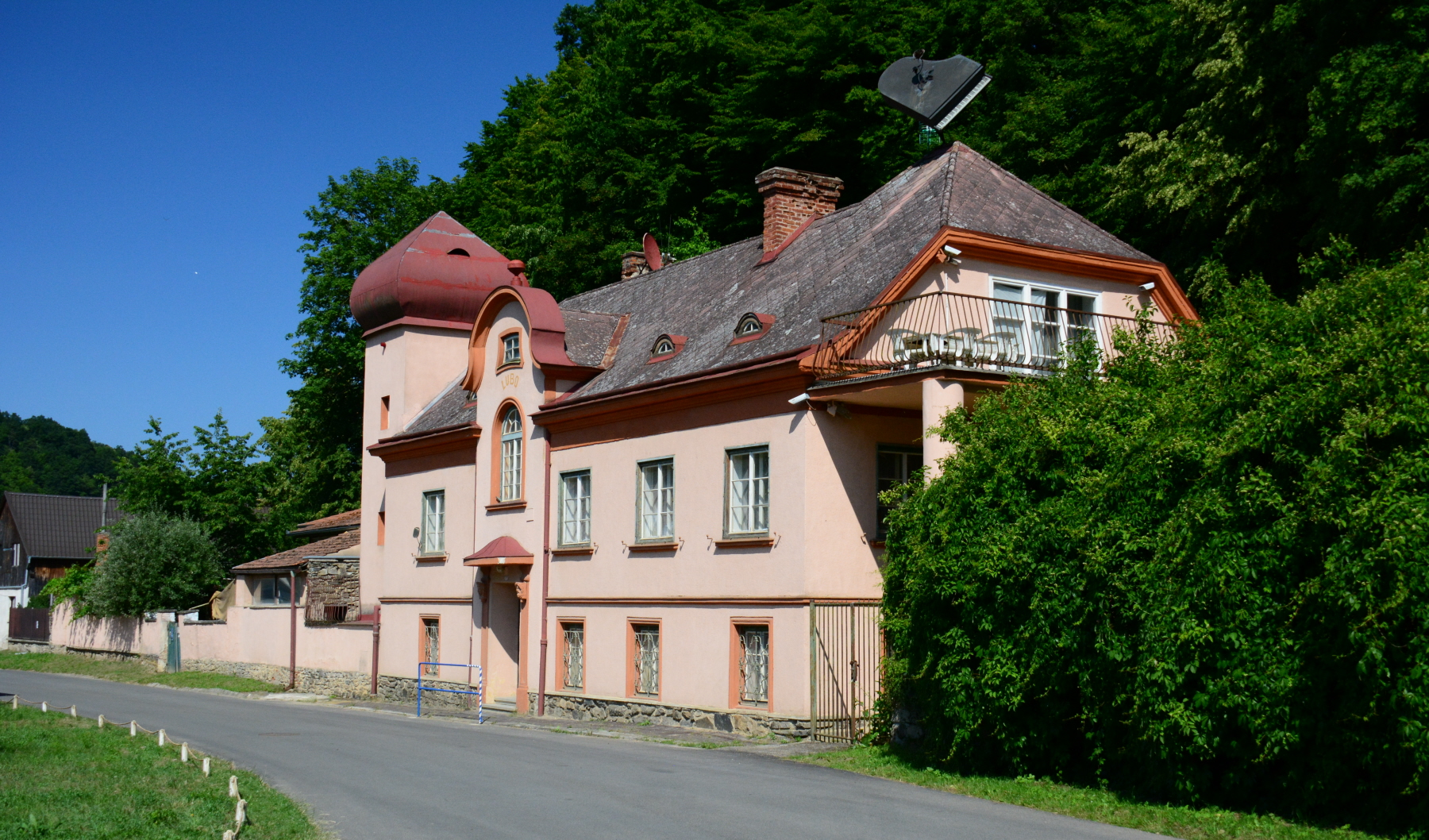 Haus Lubo in Podhradí nad Dyjí - Freistein in Südmähren (Tschechische Republik)